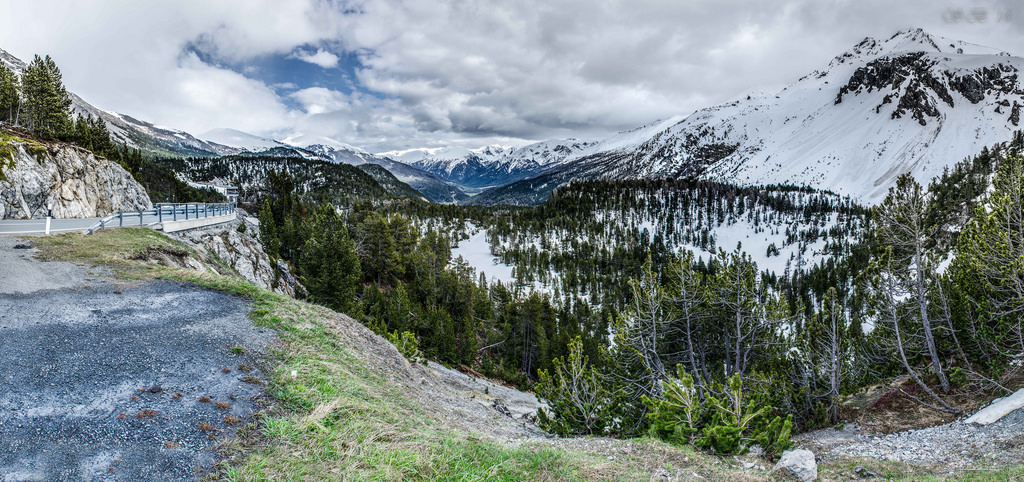 Офенпасс или перевал Фуорн